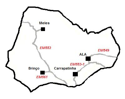 Carte d'Ala, municipalité de Macedo de Cavaleiros, district de Bragance, région Nord, Portugal.